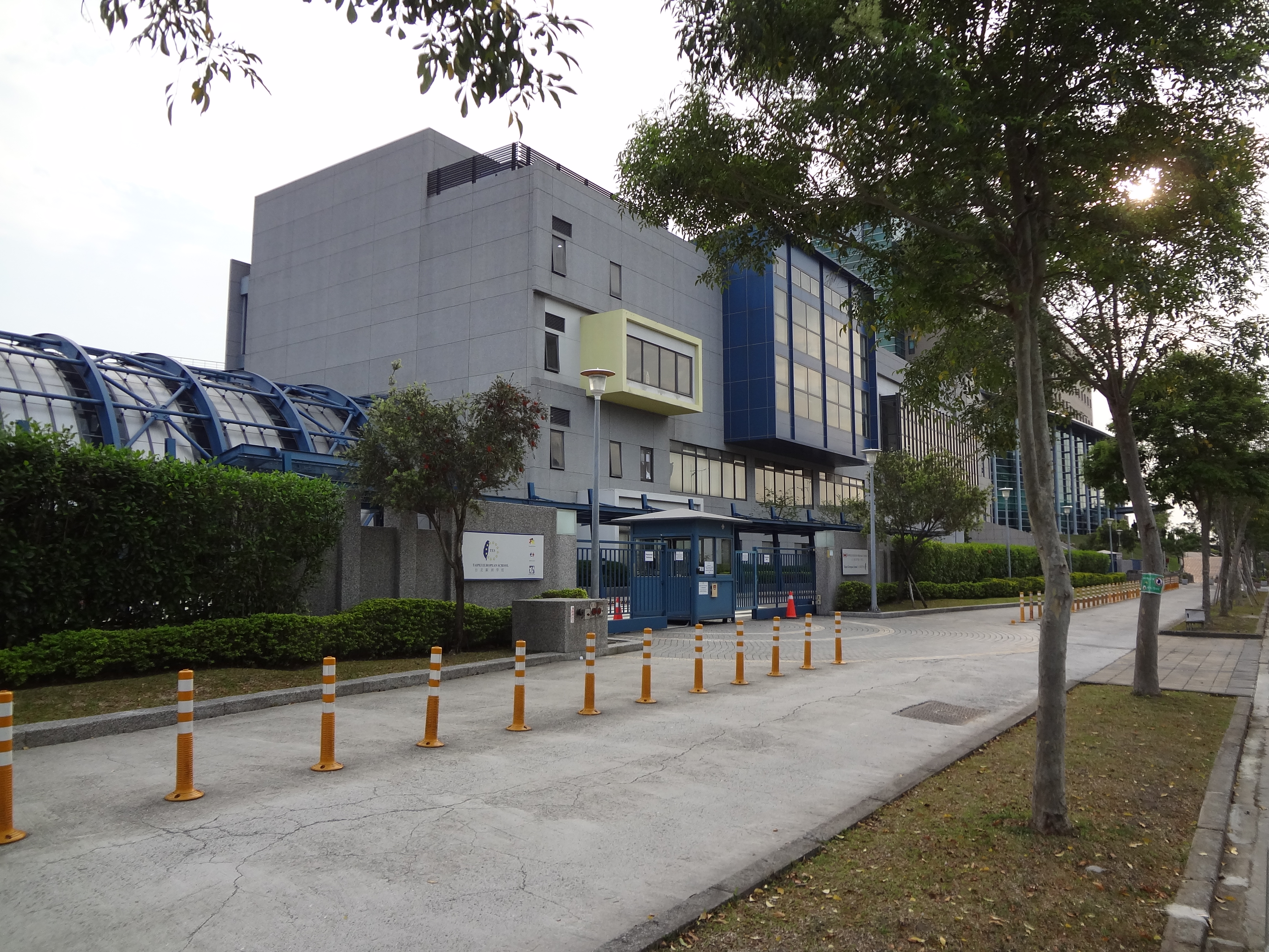 台北歐洲學校太古歐洲學園小學部，位於臺北市士林區文林路727號。